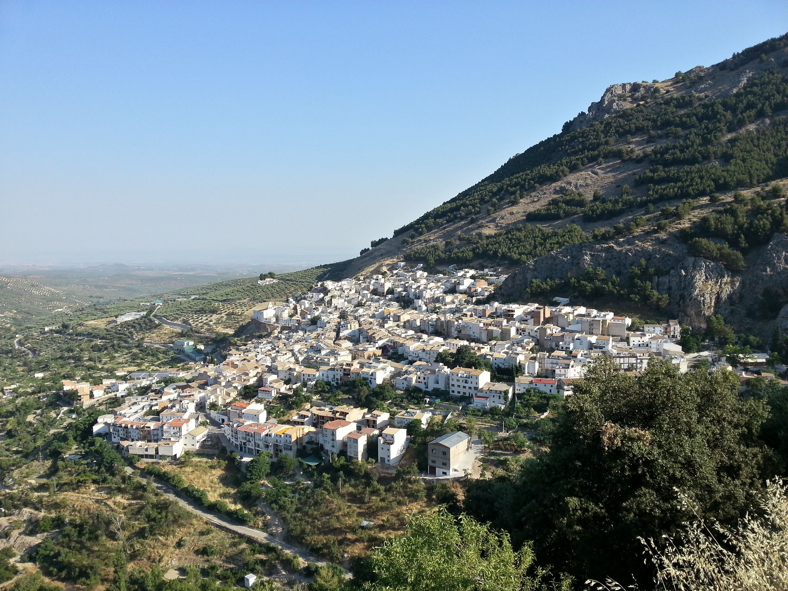 El pueblo de Torres.